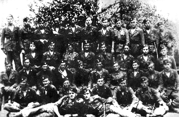 Pripadnici Ustaške vojnice iz Tomislavgrada po završetku obuke 1942.